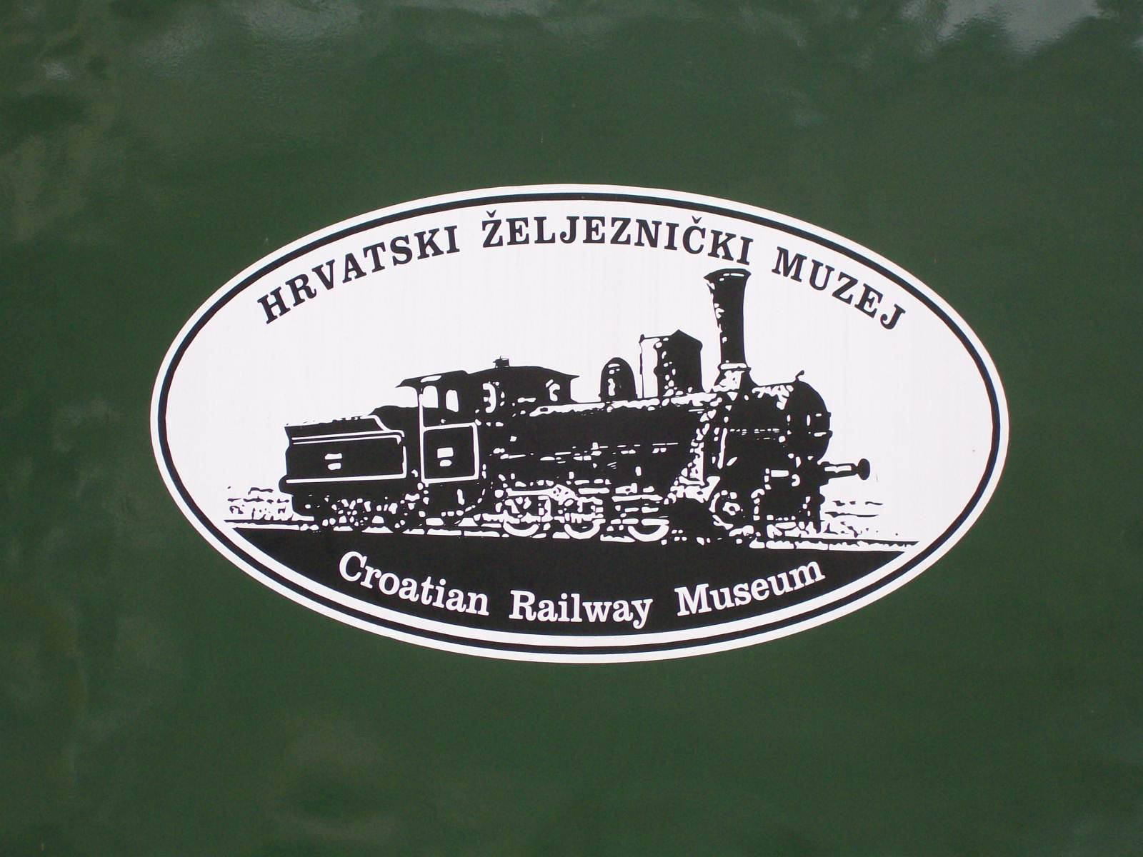 Hrvatski željeznički muzej, logo s vagona